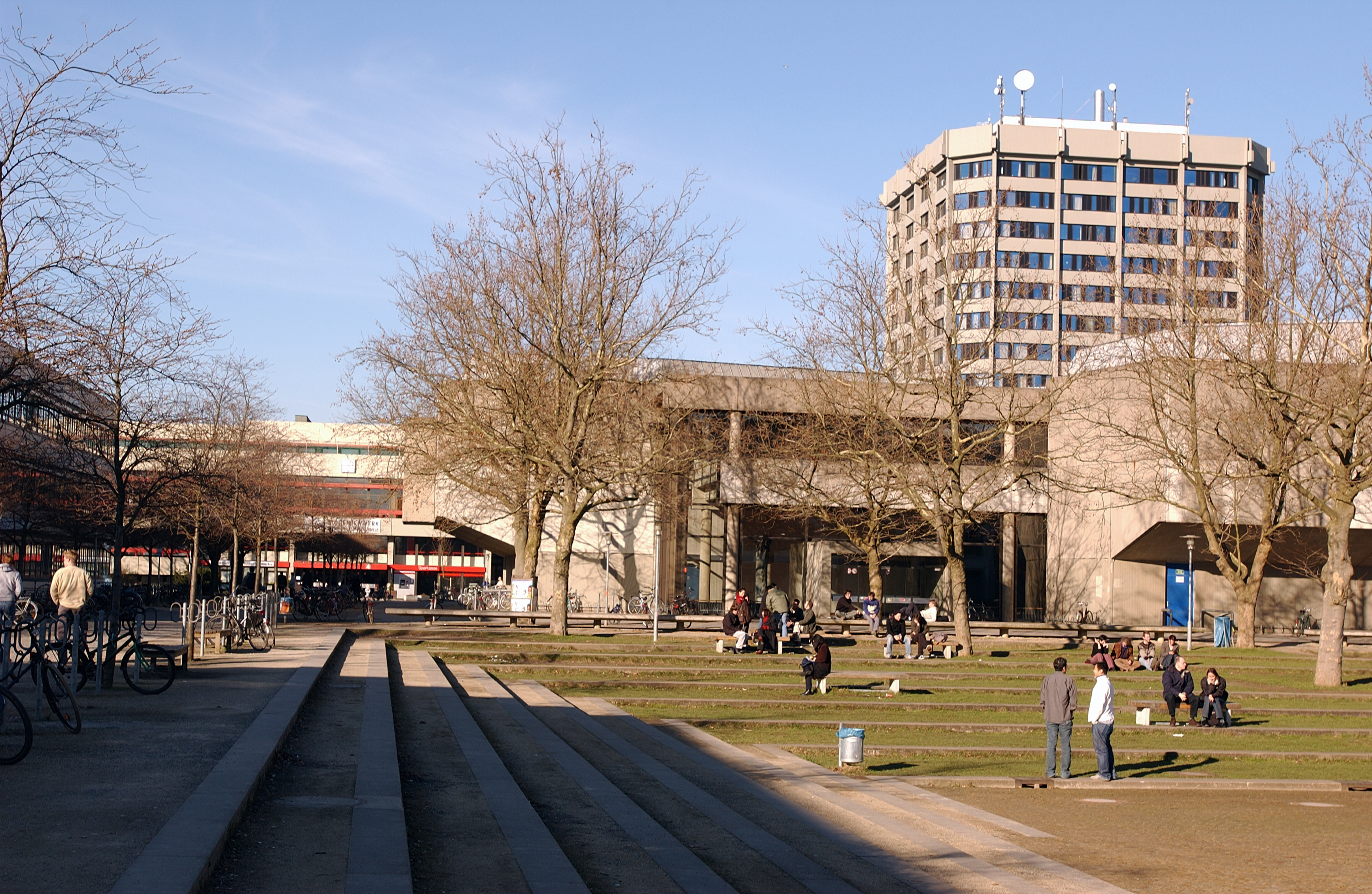 Goettingen University